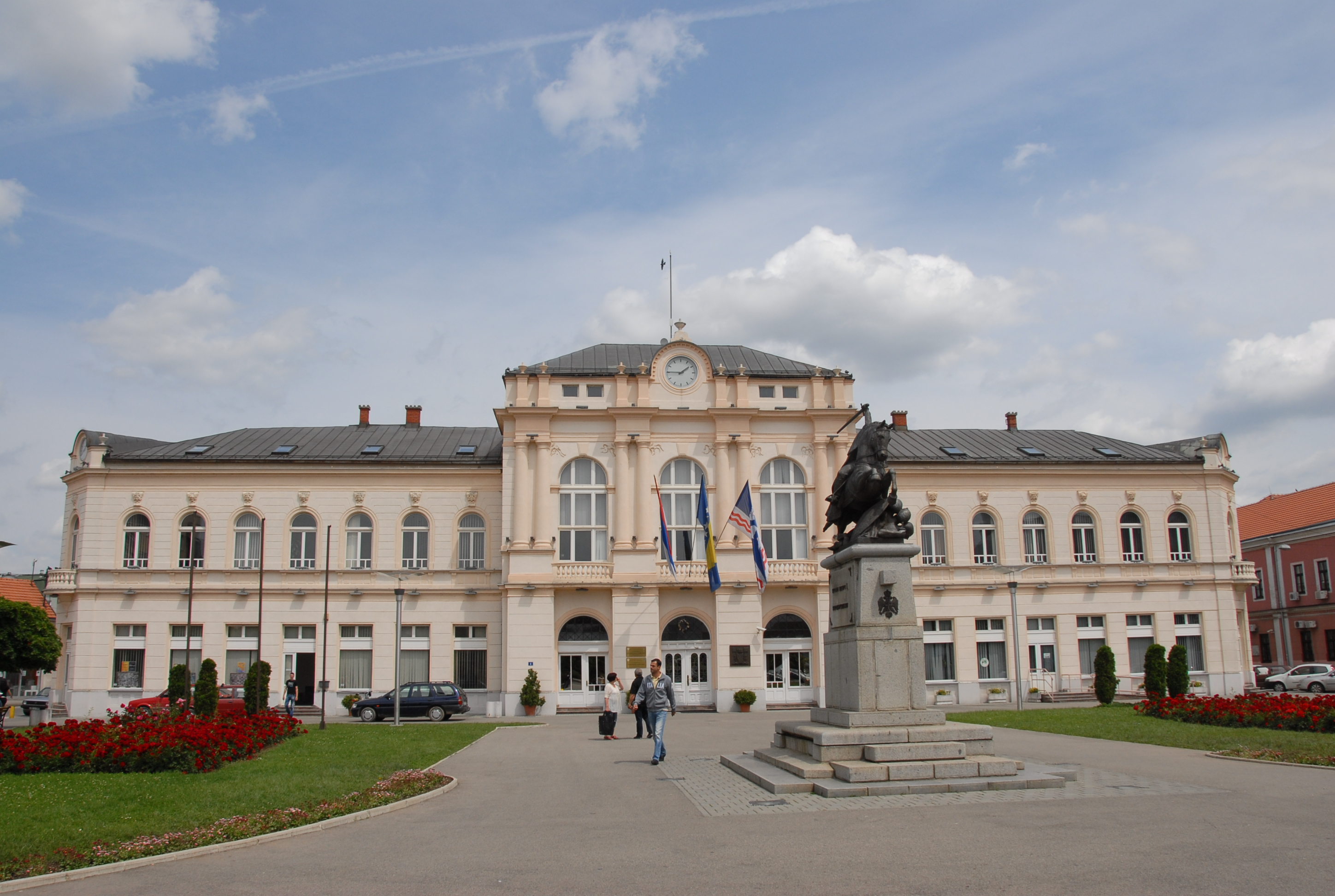 Вијећница, Бијељина ID добра: NKD211